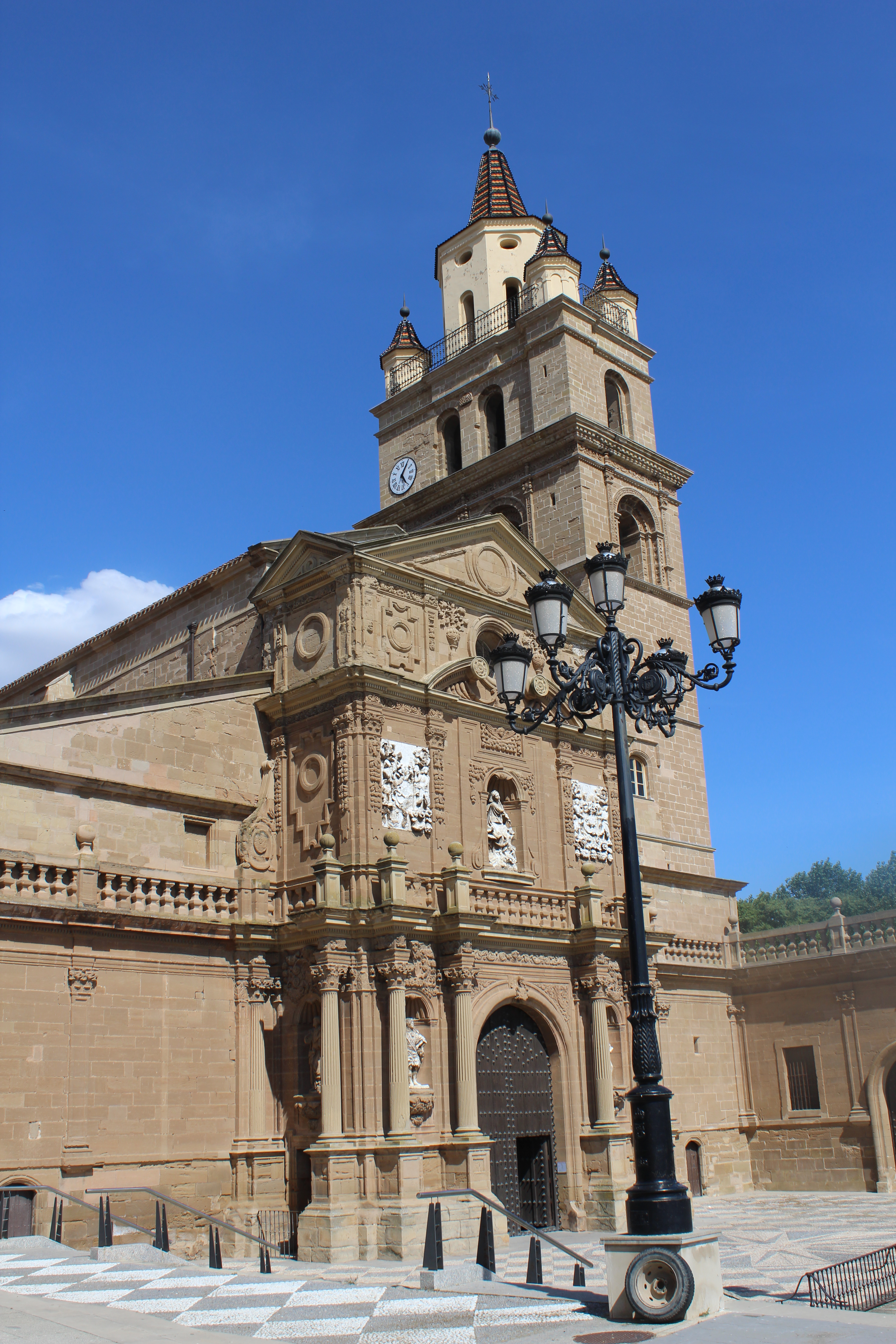 Catedral de Calahorra, primaria y sede de la Diócesis de Calahorra y La Calzada-Logroño